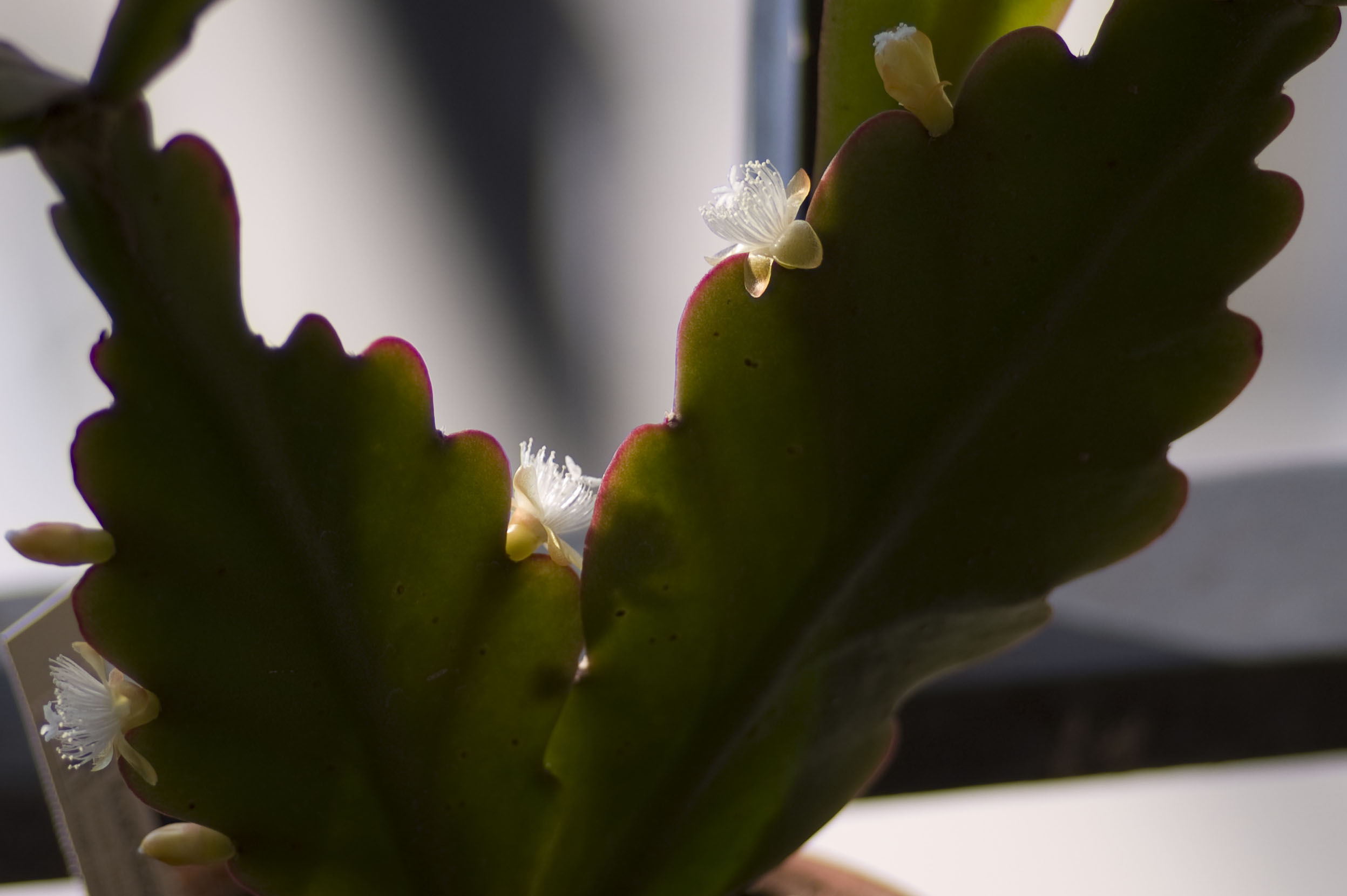 Mon Rhipsalis Pachyptera en fleur!